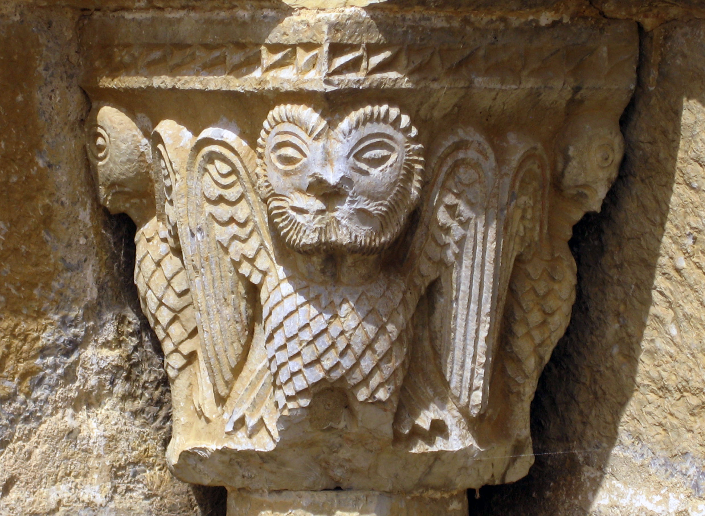 Detalle de la portada de la iglesia románica de Santa Eugenia de Saga en la Baja Cerdanya. Cataluña